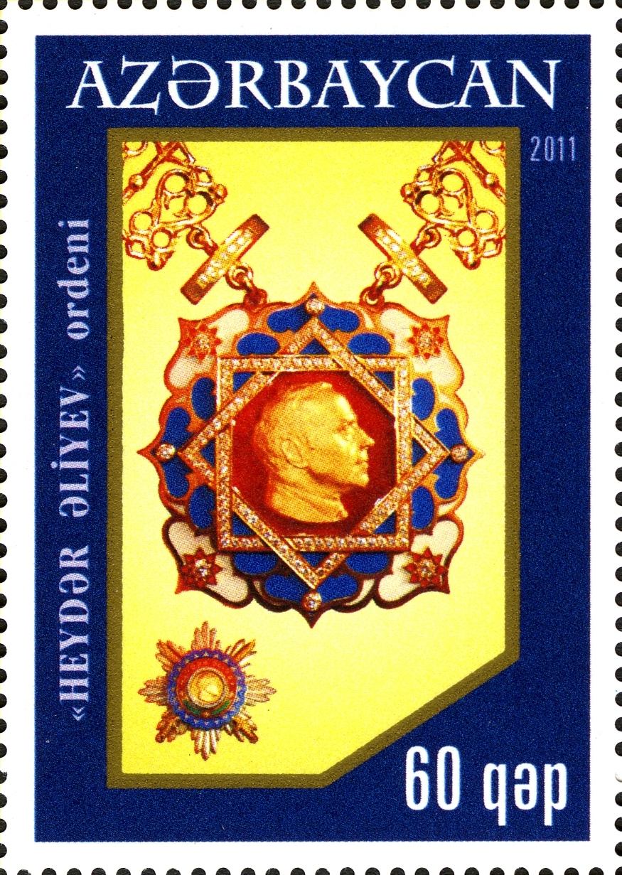 Azərbaycan Respublikasının Ordenləri.